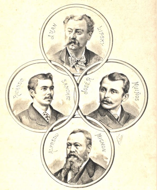 Juan Lipsky; Ricardo Sanchez; José R. Muiños; Alfredo Michon grabado aparecido en el número 13 de El Indiscreto el 24 de agosto de 1884